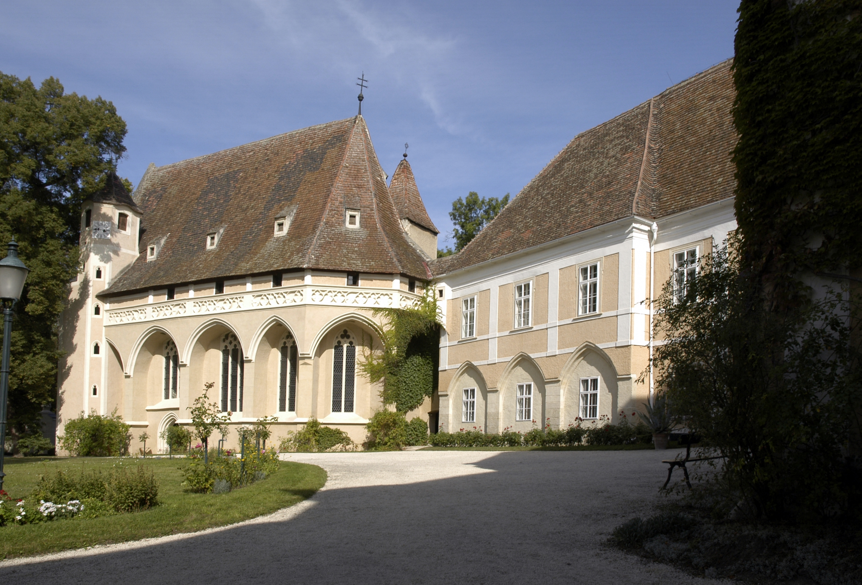 Schrattenthal - Schlosskapelle und Schloss Dieses Bild wurde anlässlich des österreichischen Tags des Denkmals 2012 in Niederösterreich eingereicht.